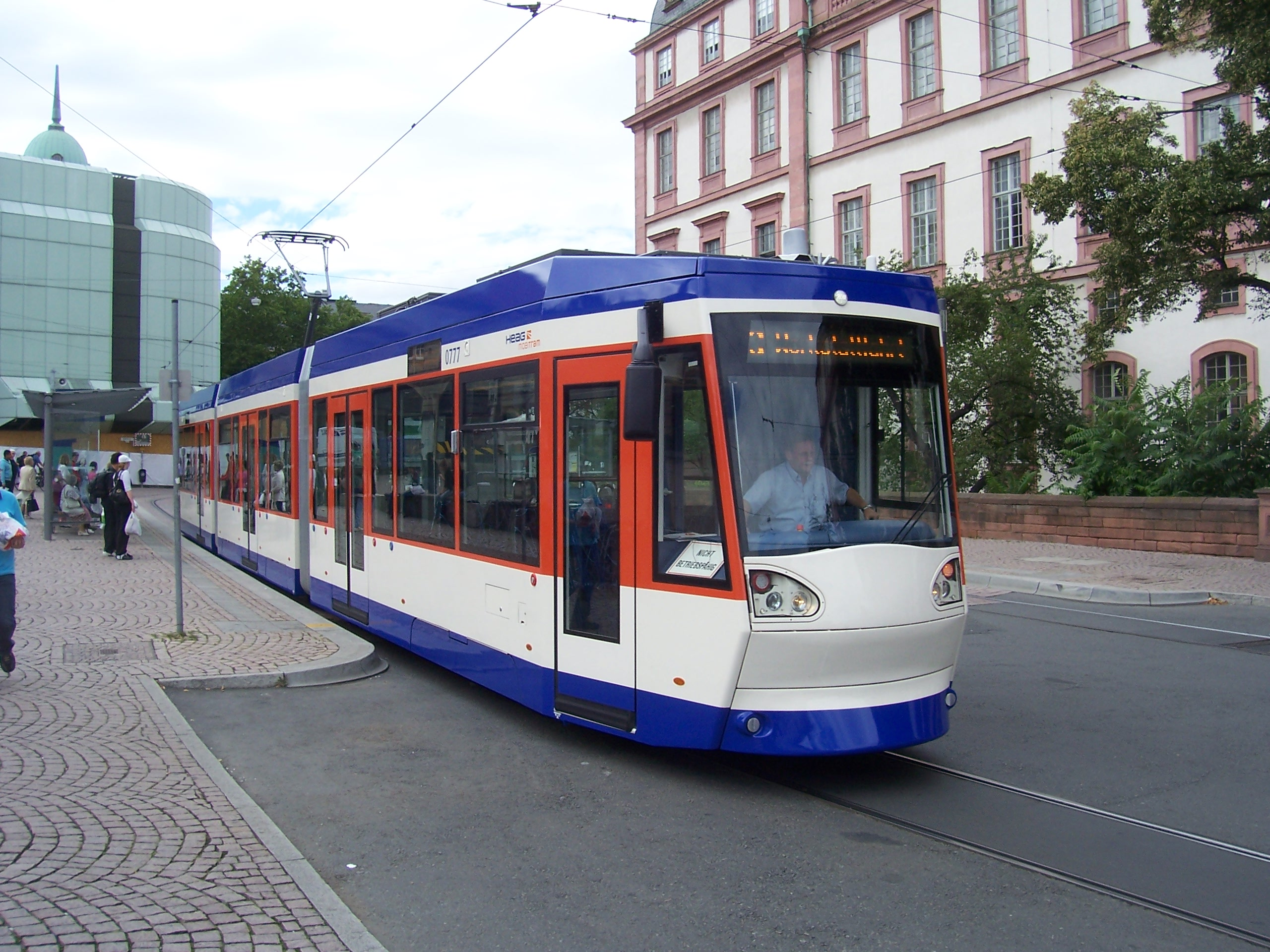 Straßenbahn 0777 der HEAG mobilio in Darmstadt am Schloss